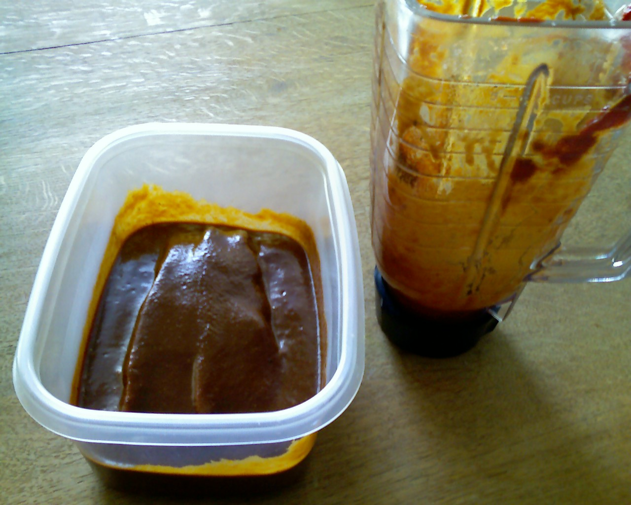 Homemade barbecue sauce